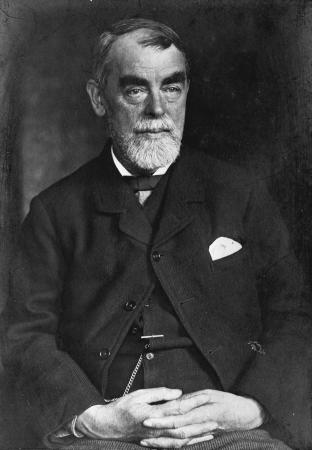 Samuel Butler (novelist) (1835-1902)